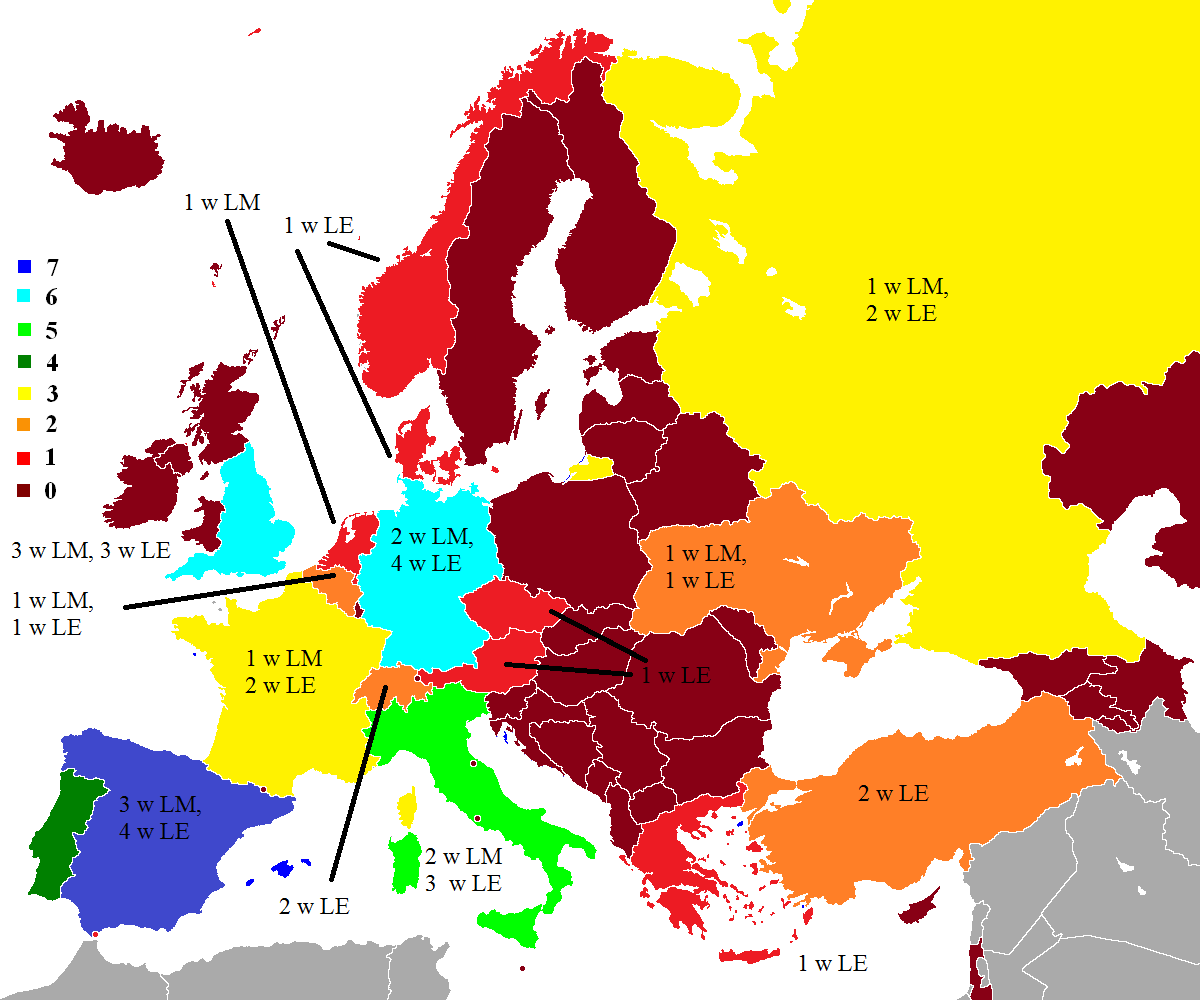 Wykaz krajów, które mają swych reprezentantów w pucharach europejskich.